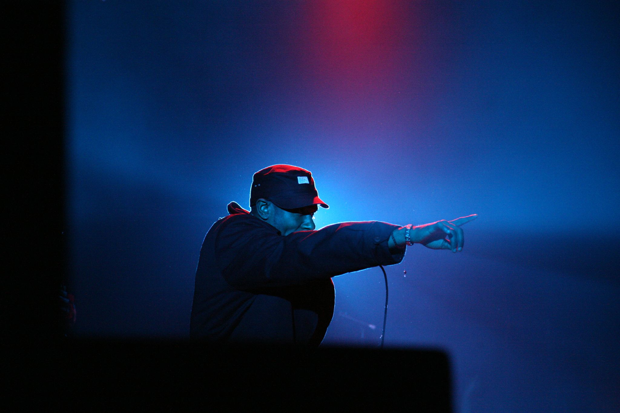 Mos Def live